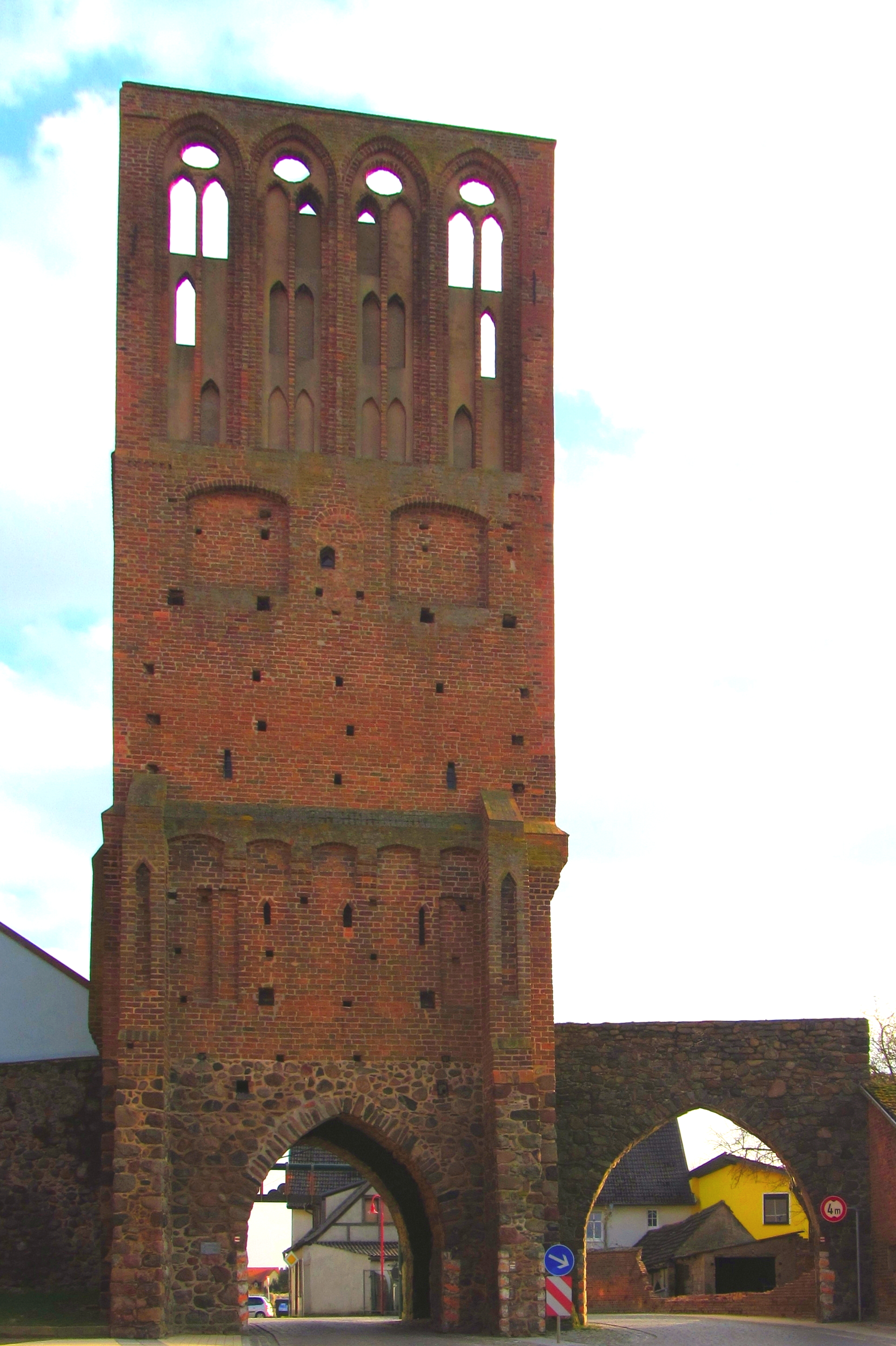 Aufnahme des Stettiner Tor´s in Gartz/Oder. Erbaut im 13. Jahrhundert.